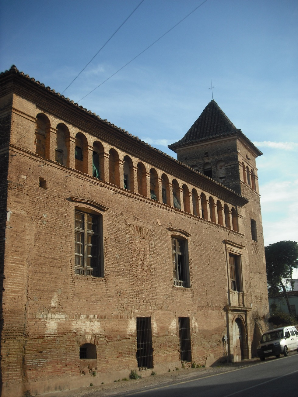 Casa de la Sirena. Aunque está en el casco de Benifaraig, pertenece al municipio de Alfara del Patriarca